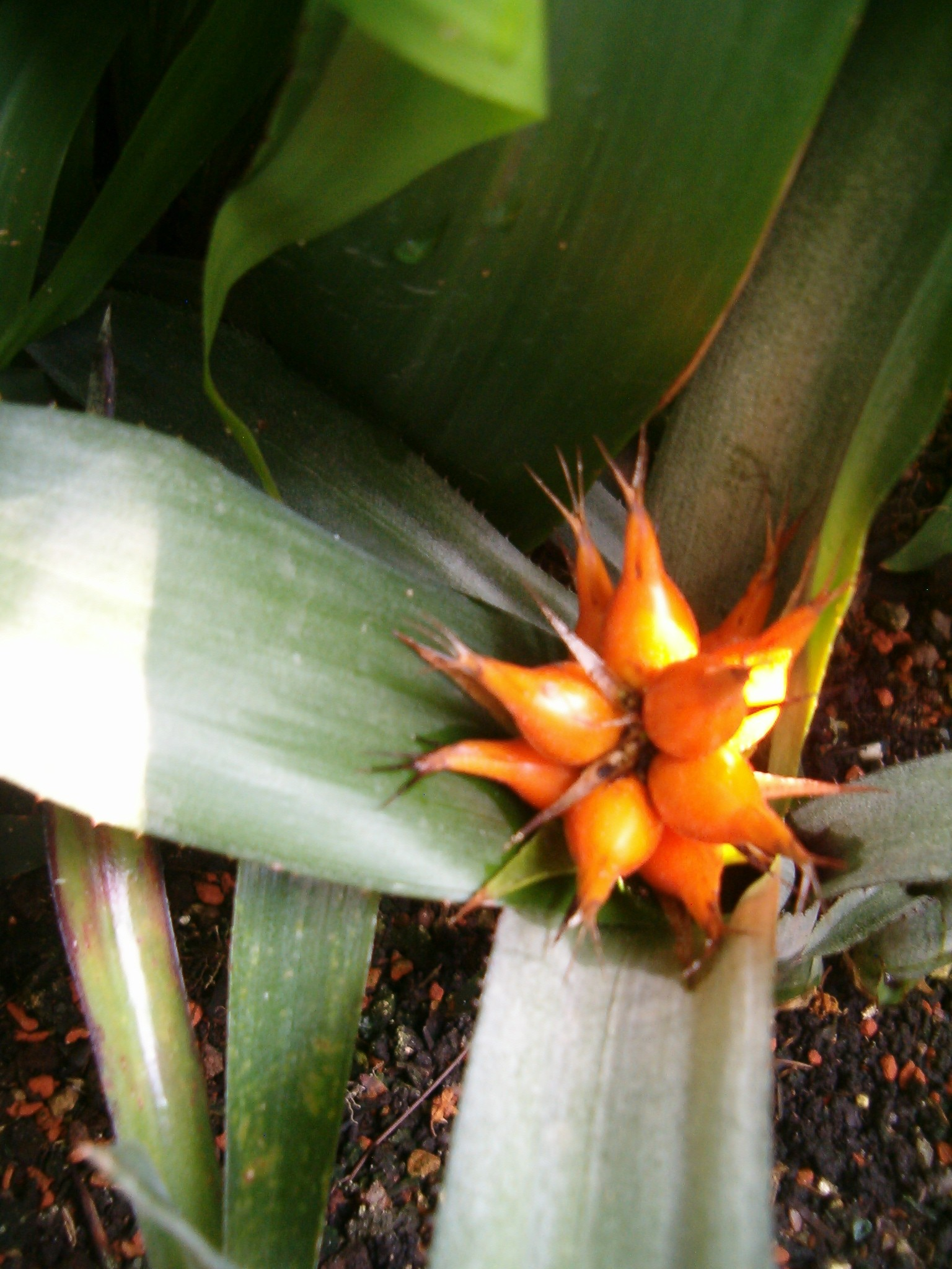 At Botanical Gardens Berlin-Dahlem Species Ronnbergia petersii